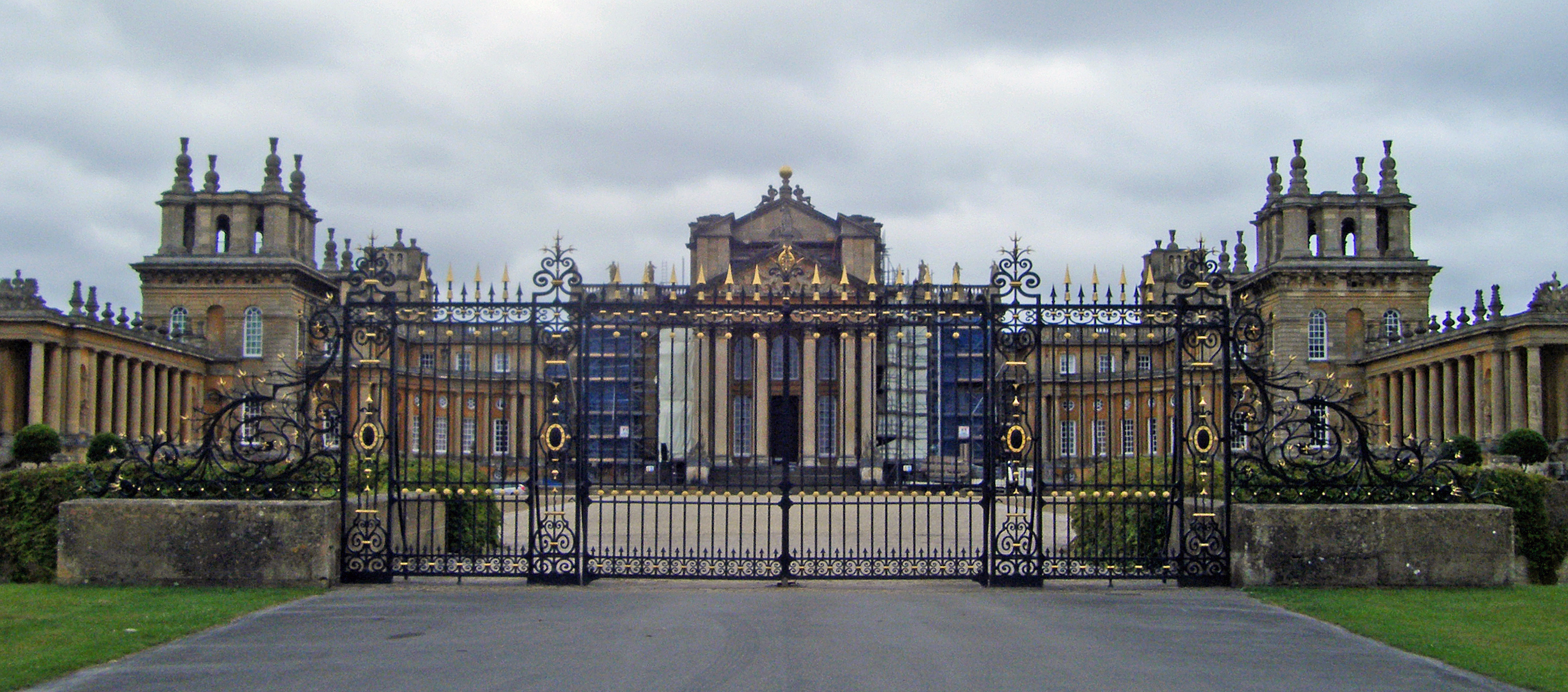 Vue d'ensemble de Blenheim palace